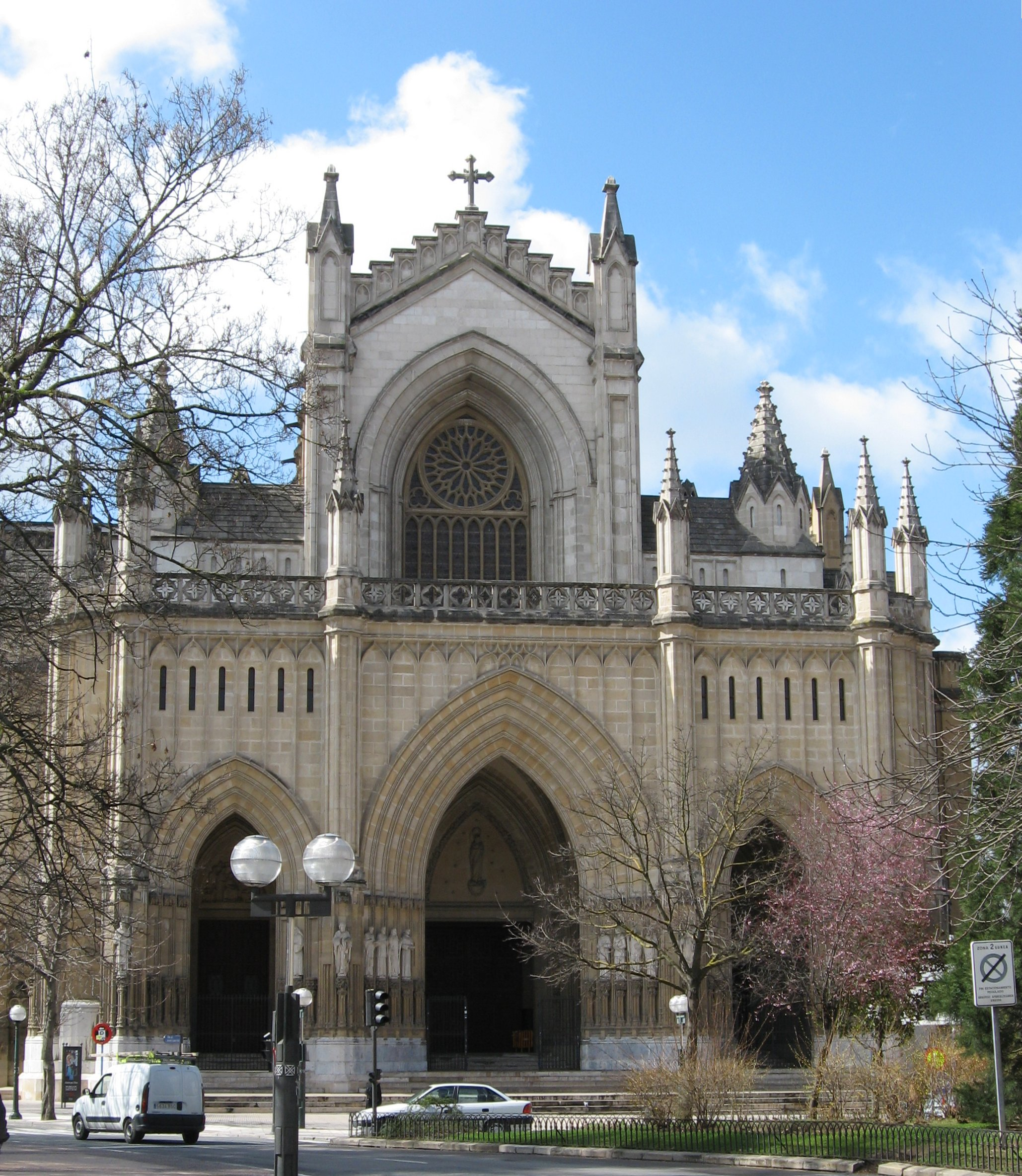 Desc: Catedral nueva de Vitoria-Gasteiz